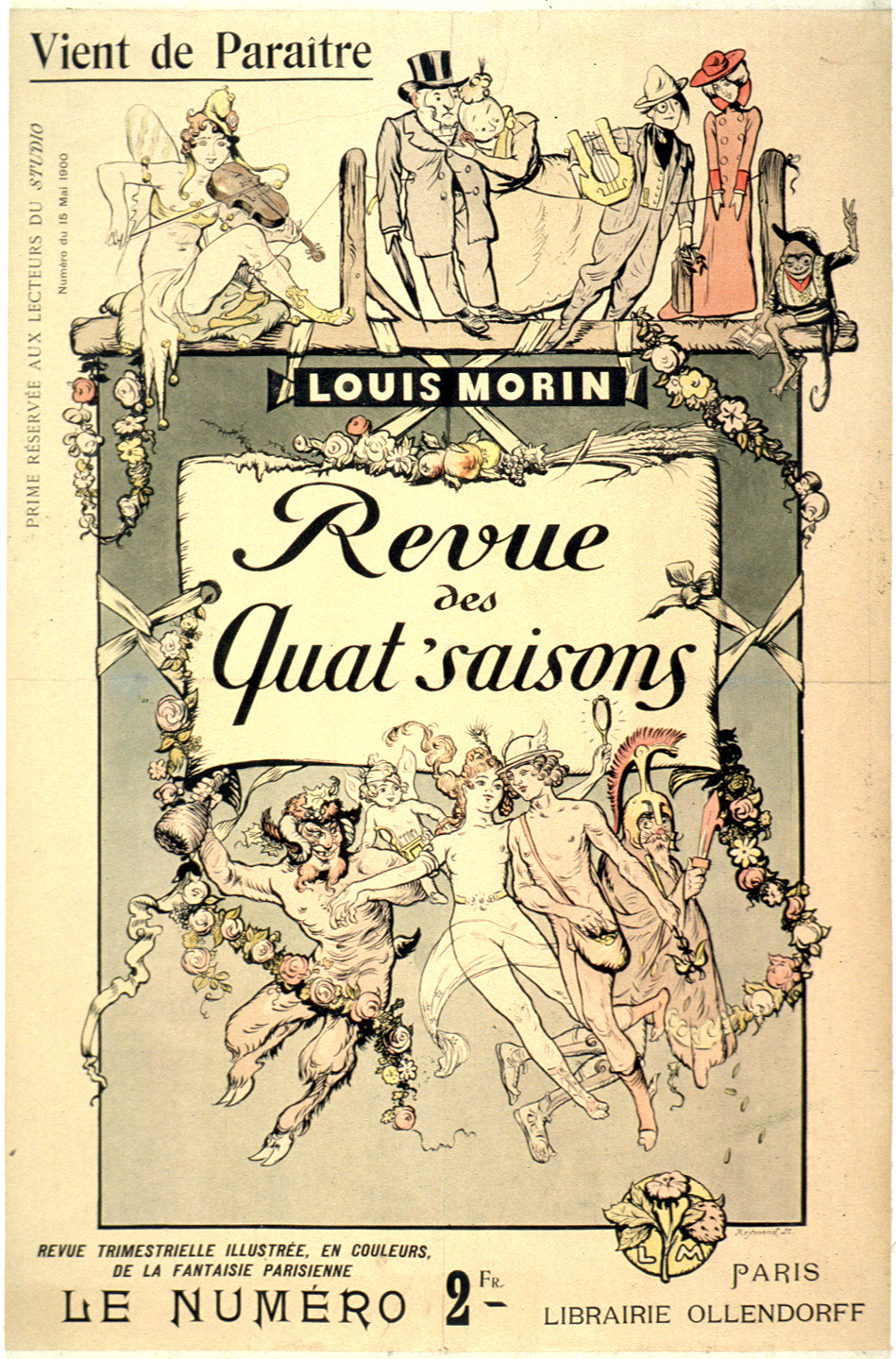 couverture de la Revue des Quat' Saisons